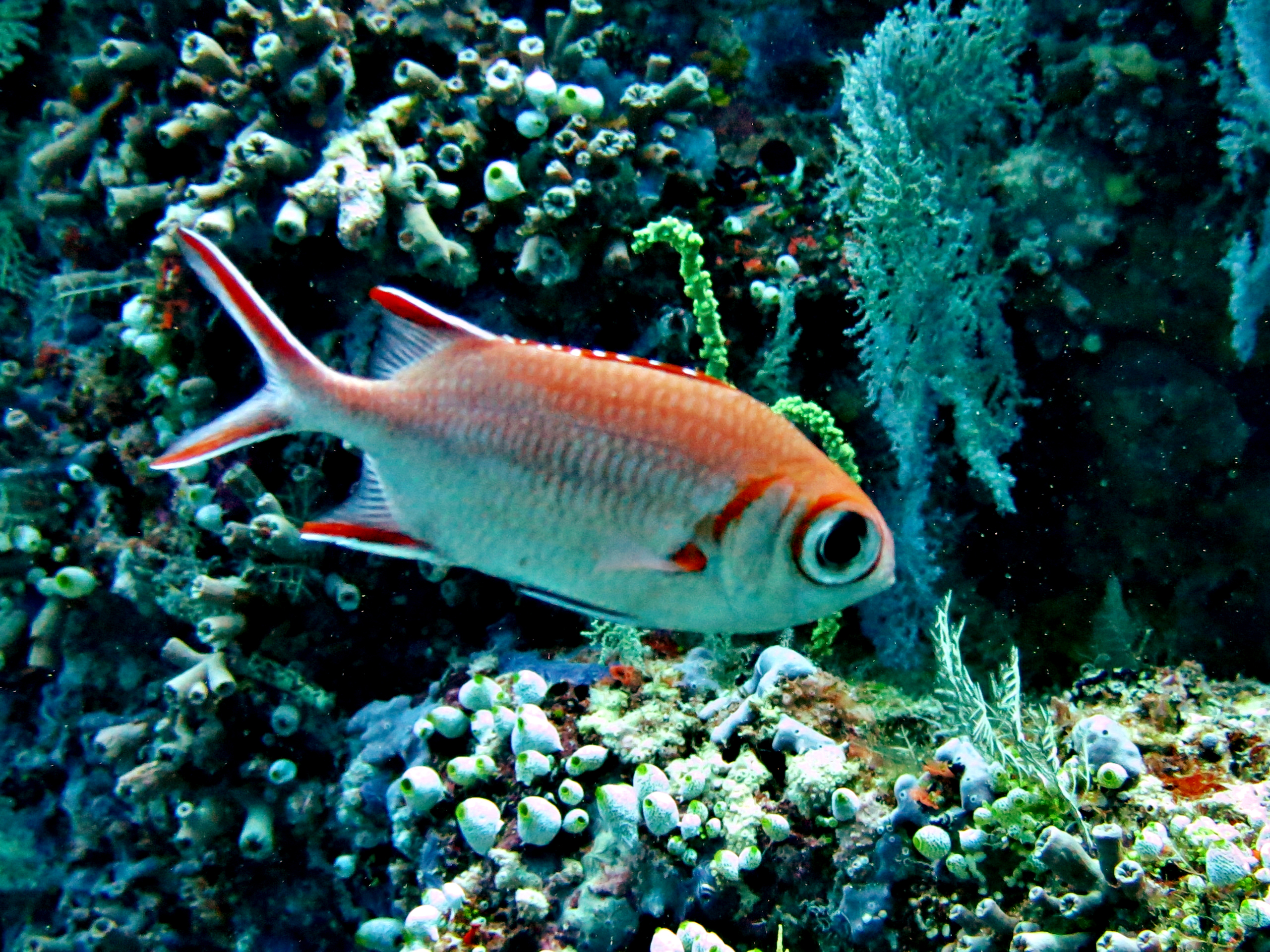 Un poisson-soldat de Berndt (Myripristis berndti) aux Maldives (atoll de Baa).